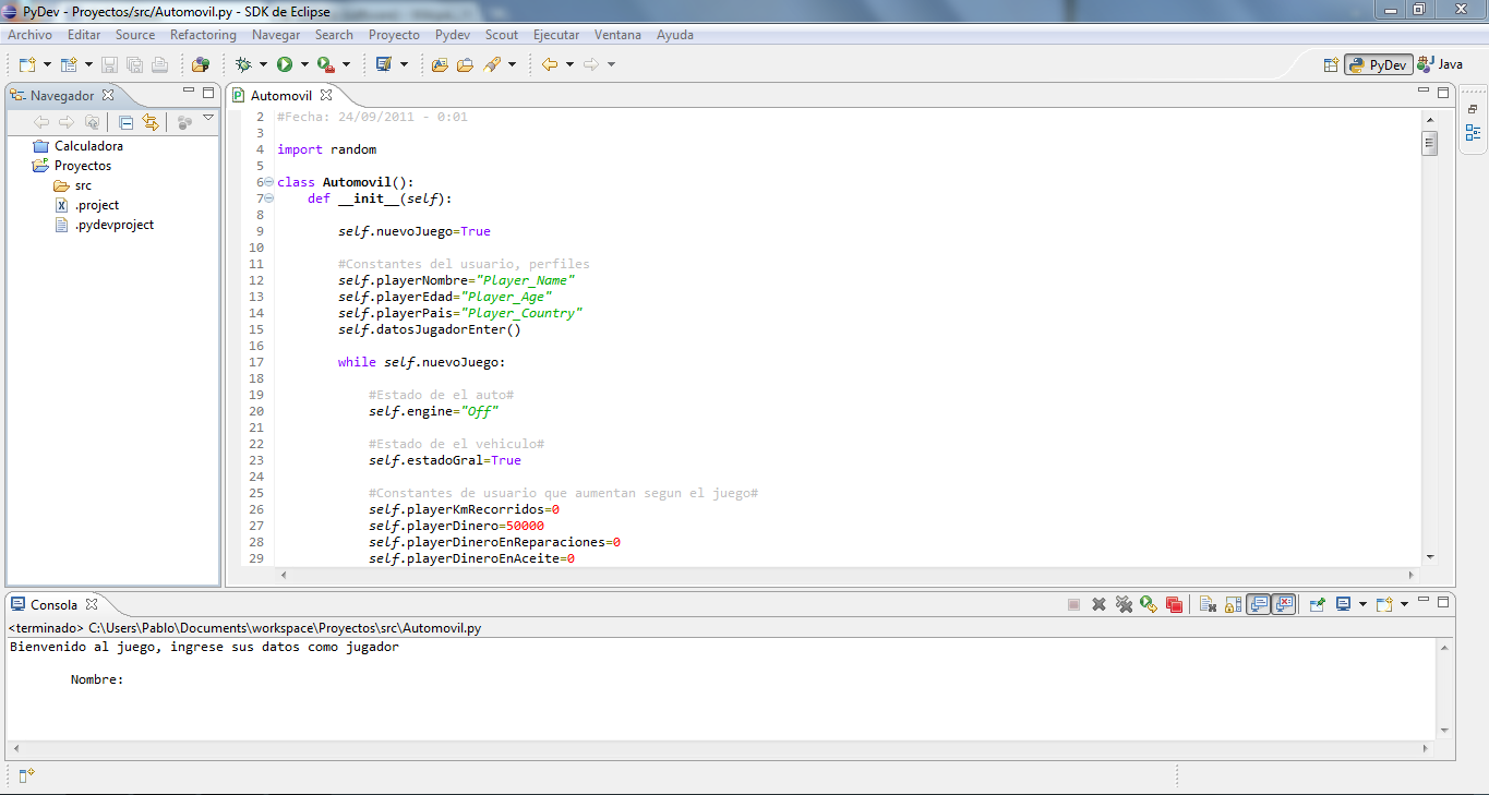 Captura del programa Eclipse programando con Pyhton